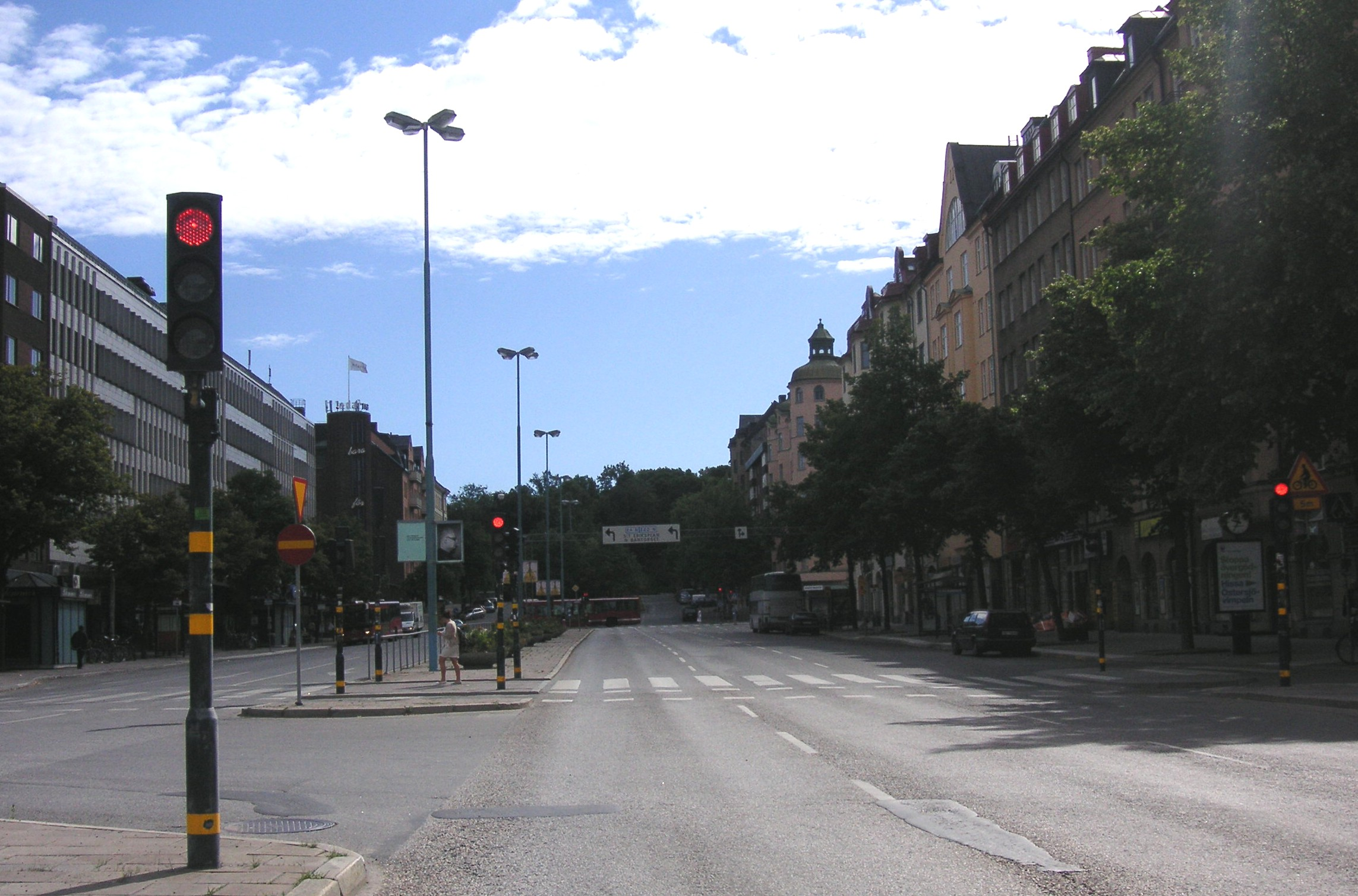 Fridhemsplan på Kungsholmen i Stockholm